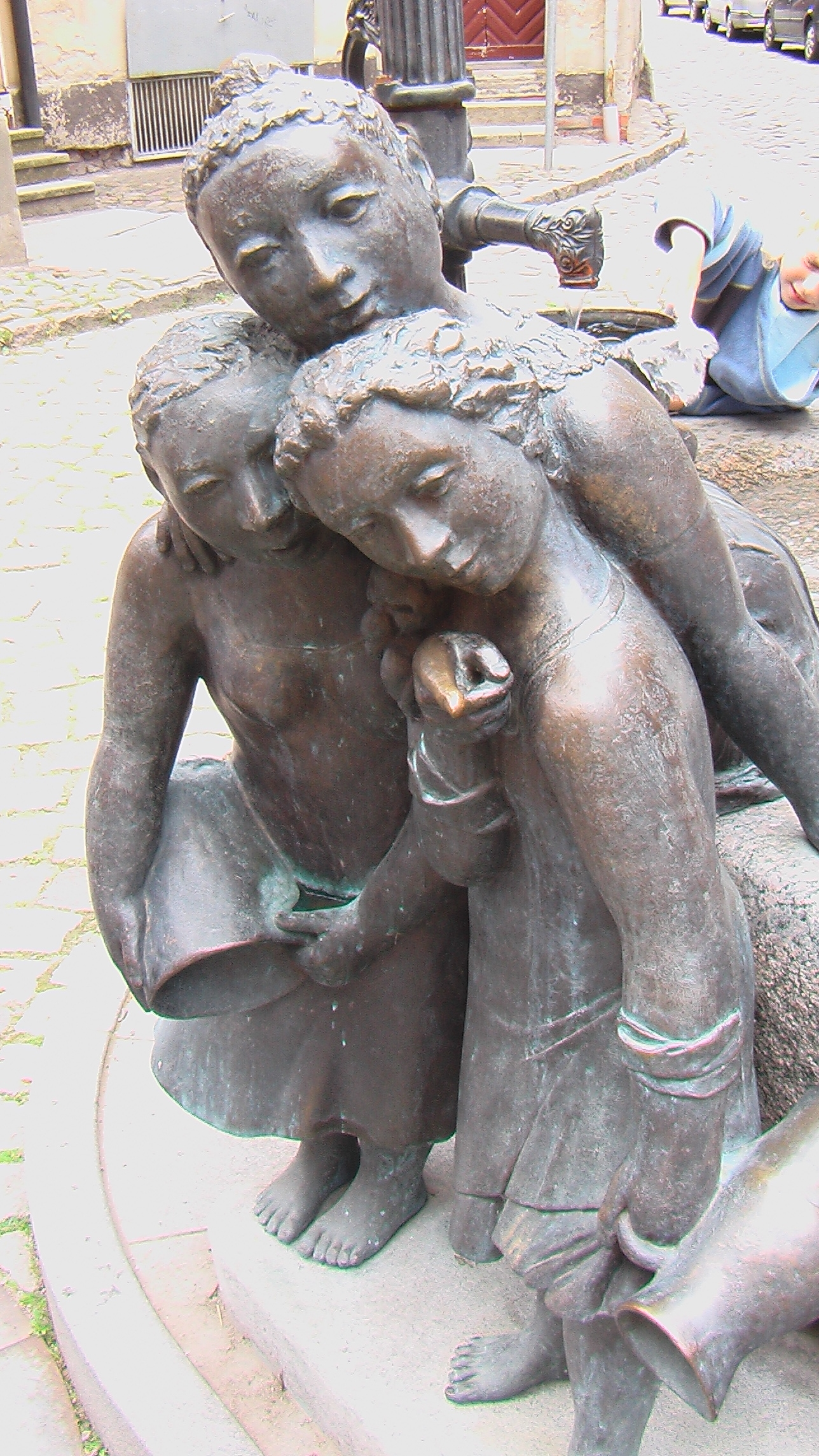 Stralsund, Brunnen in der Altstadt (Fährstraße)